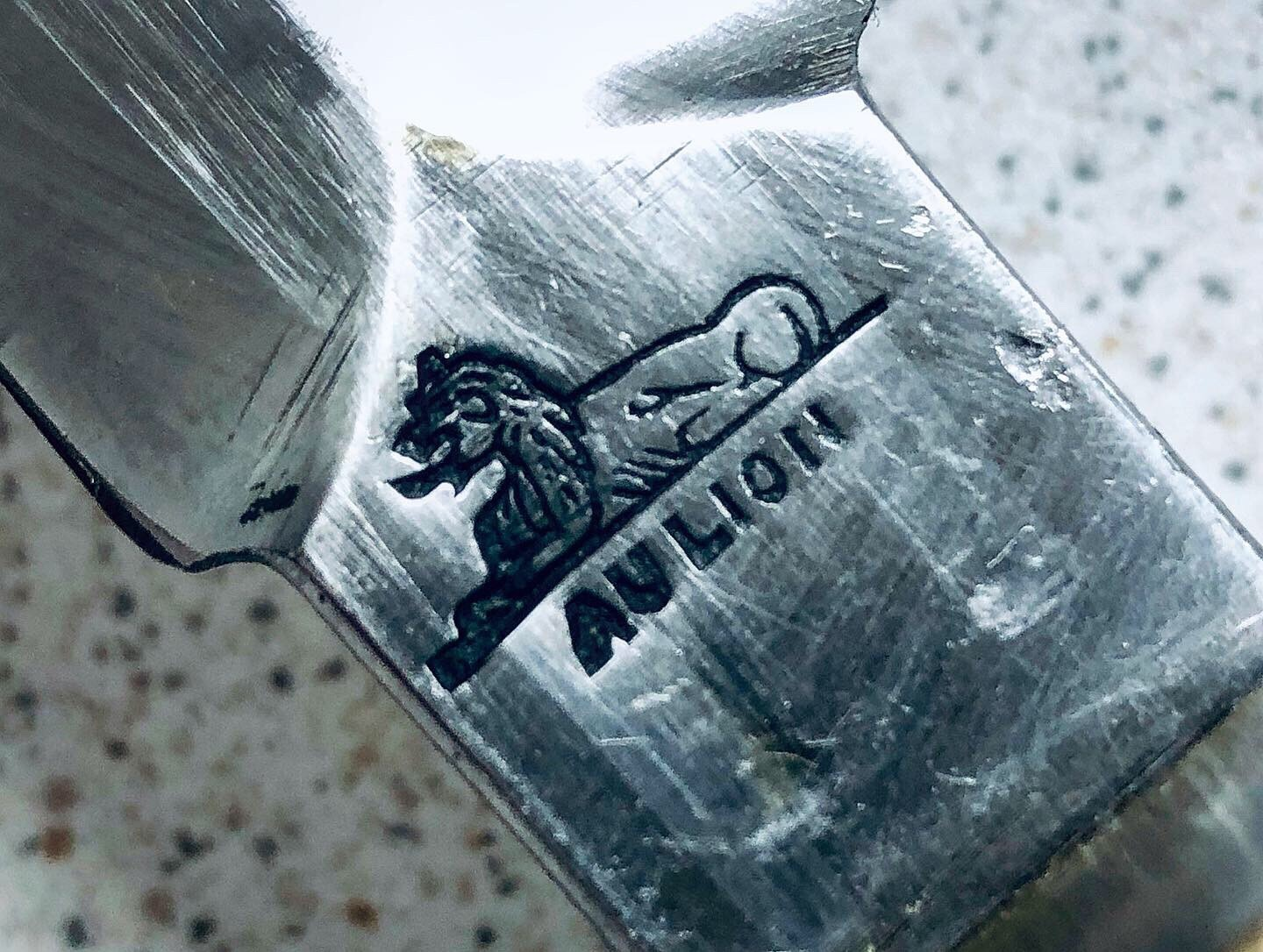 Aulion mark 1 tranch knife logo